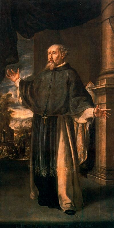 La obra representa a Fray Hernando de Talavera (1428-1507), que fue prior del monasterio de Nuestra Señora del Prado en Valladolid, obispo de Ávila, arzobispo de Granada y confesor y consejero de la reina Isabel la Católica.